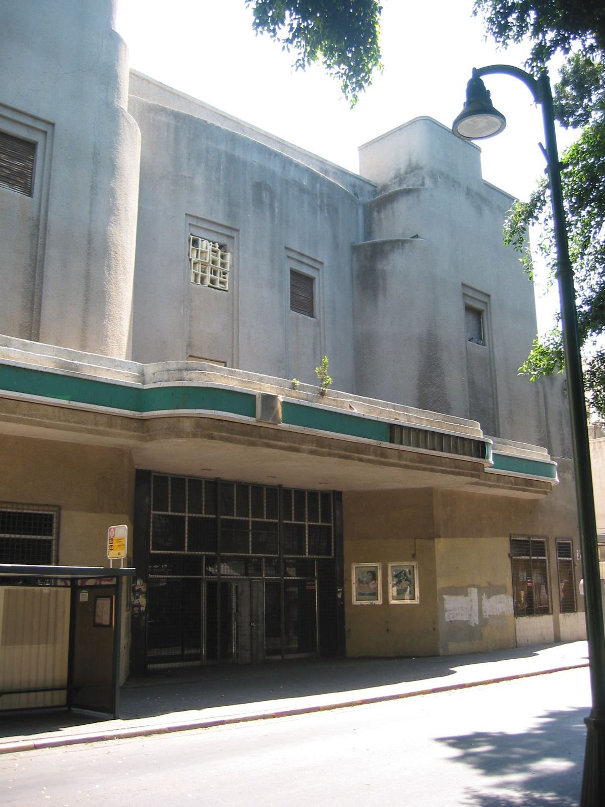 Alhambra Cinema in Jaffa